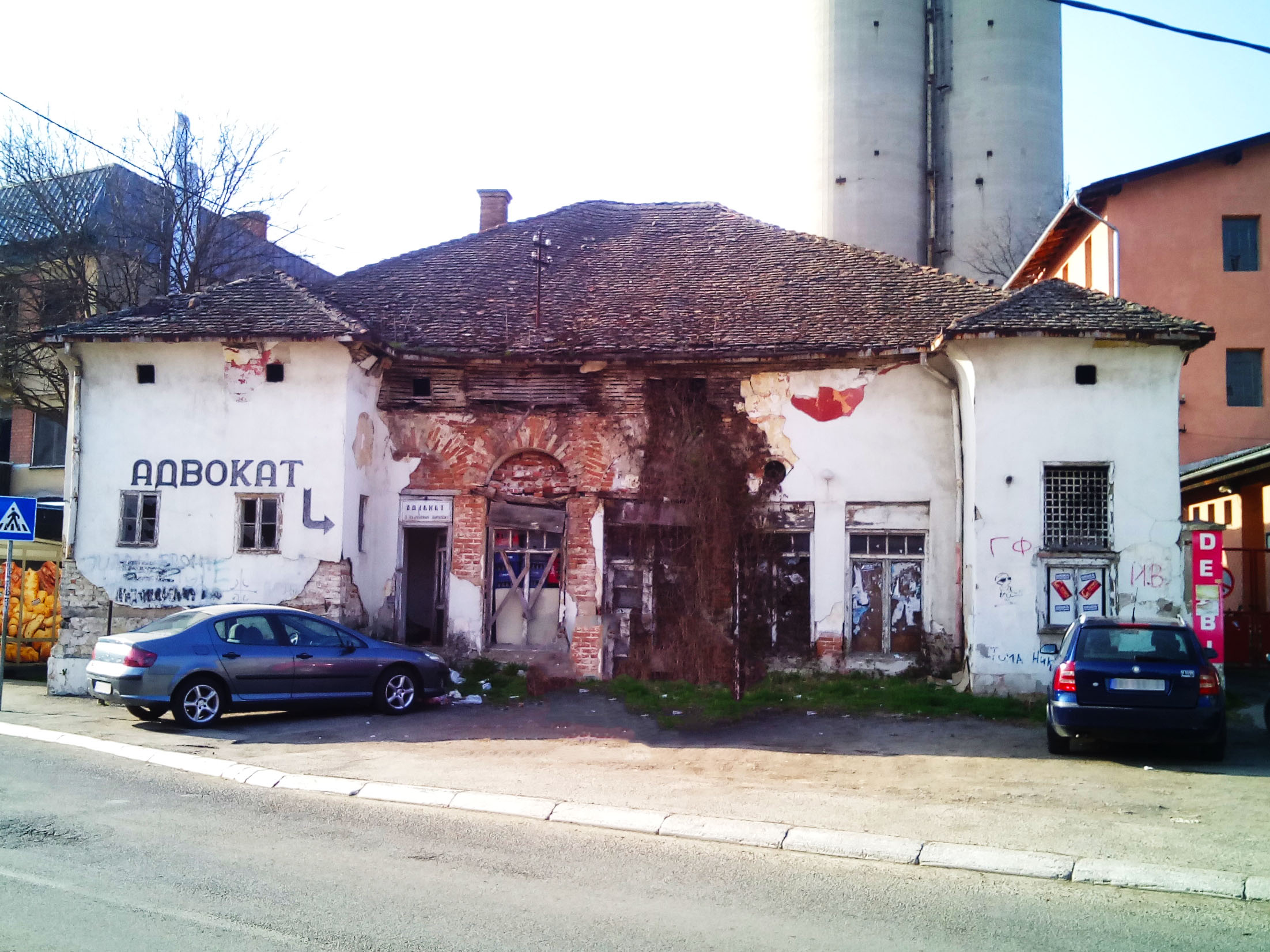 Stara mehana u Barajevu. Mart 2017. Српски (ћирилица): Стара механа у Барајеву. Март 2107.